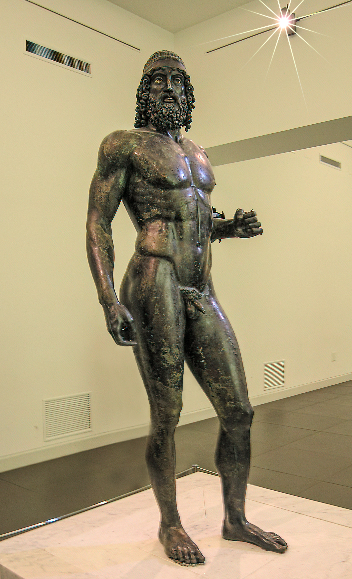 Museo Nazionale a Reggio di Calabria